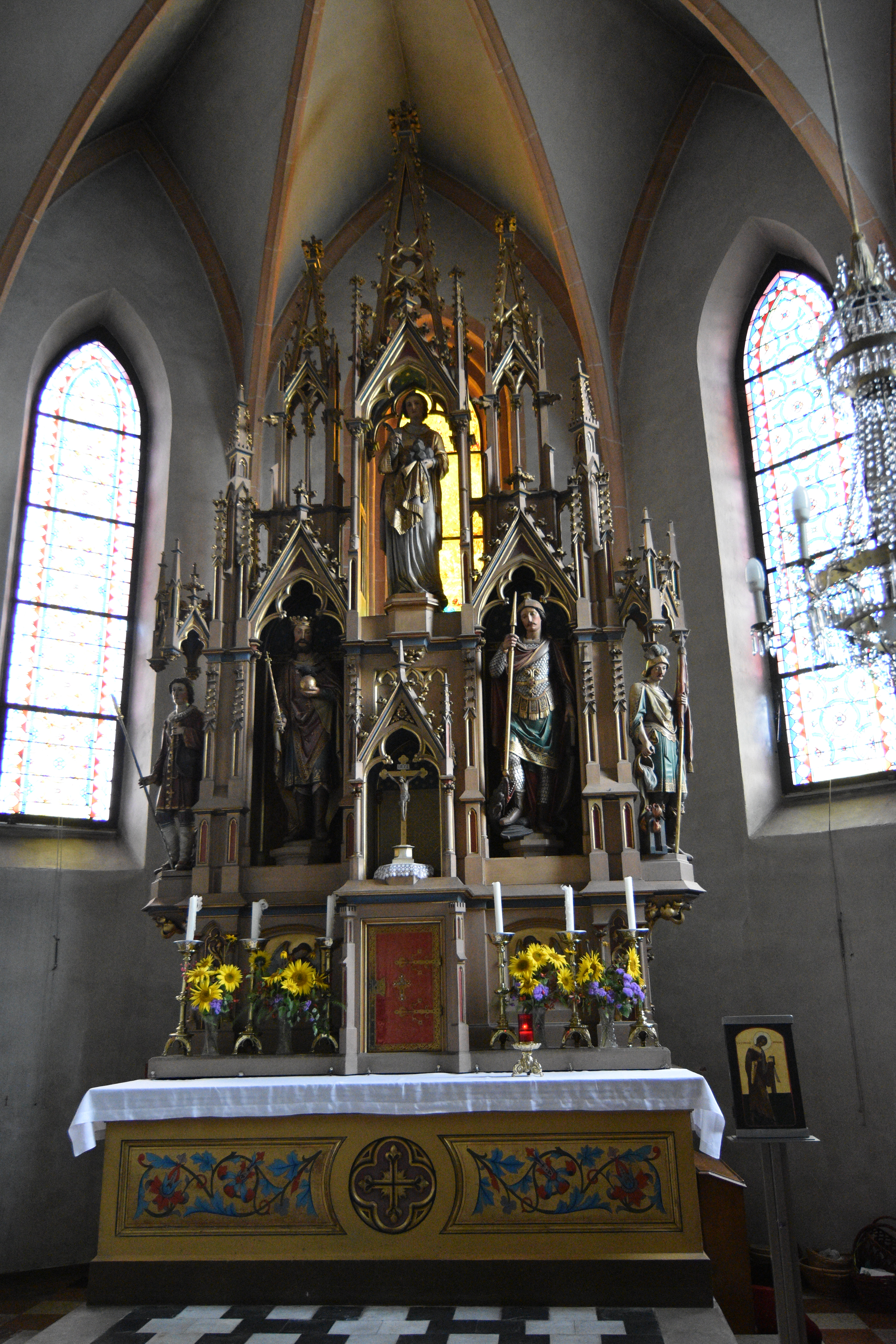 Pfarrkirche Sankt Stefan ob Stainz - Interior